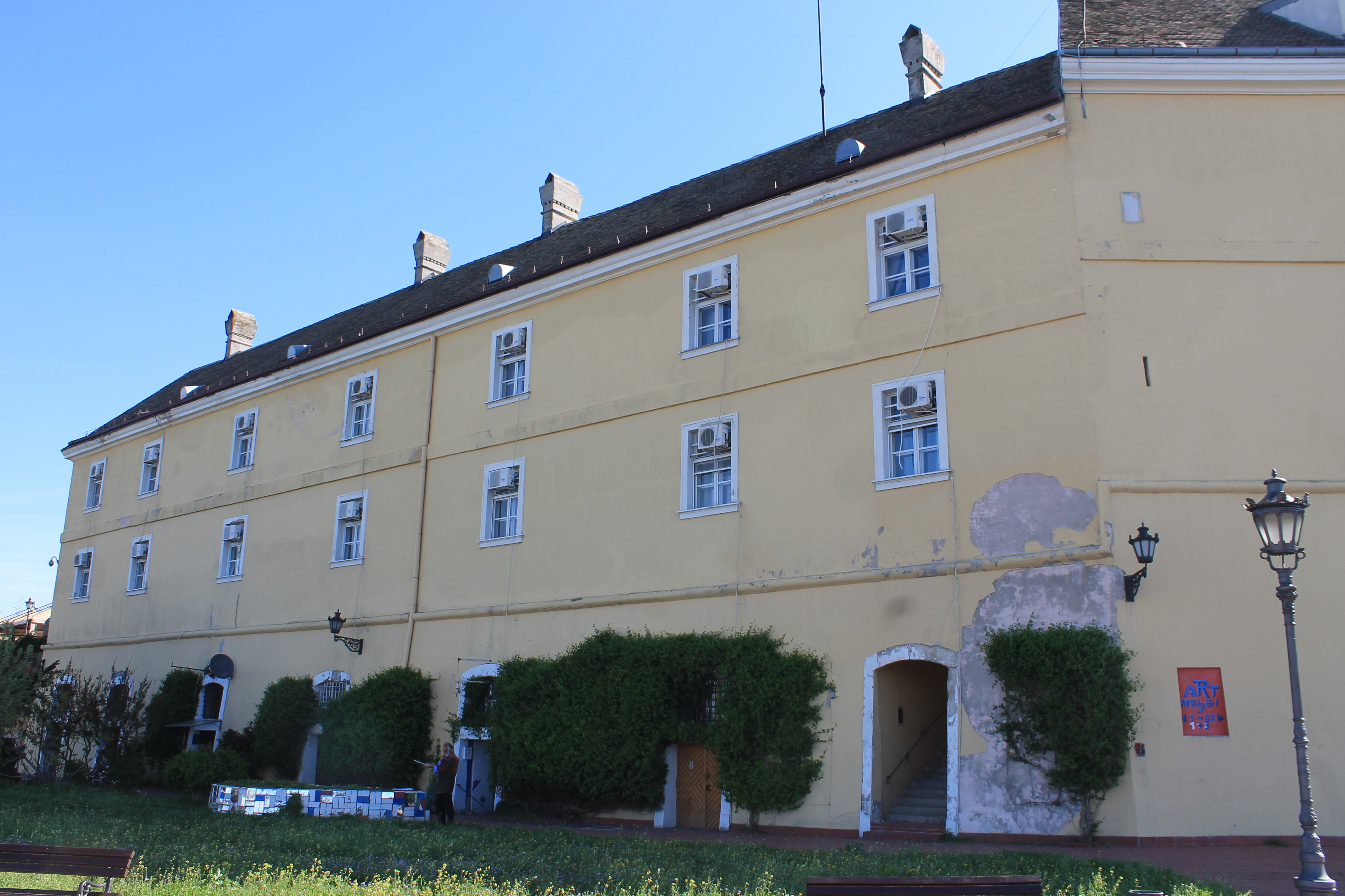 Petrovaradinska tvrđava